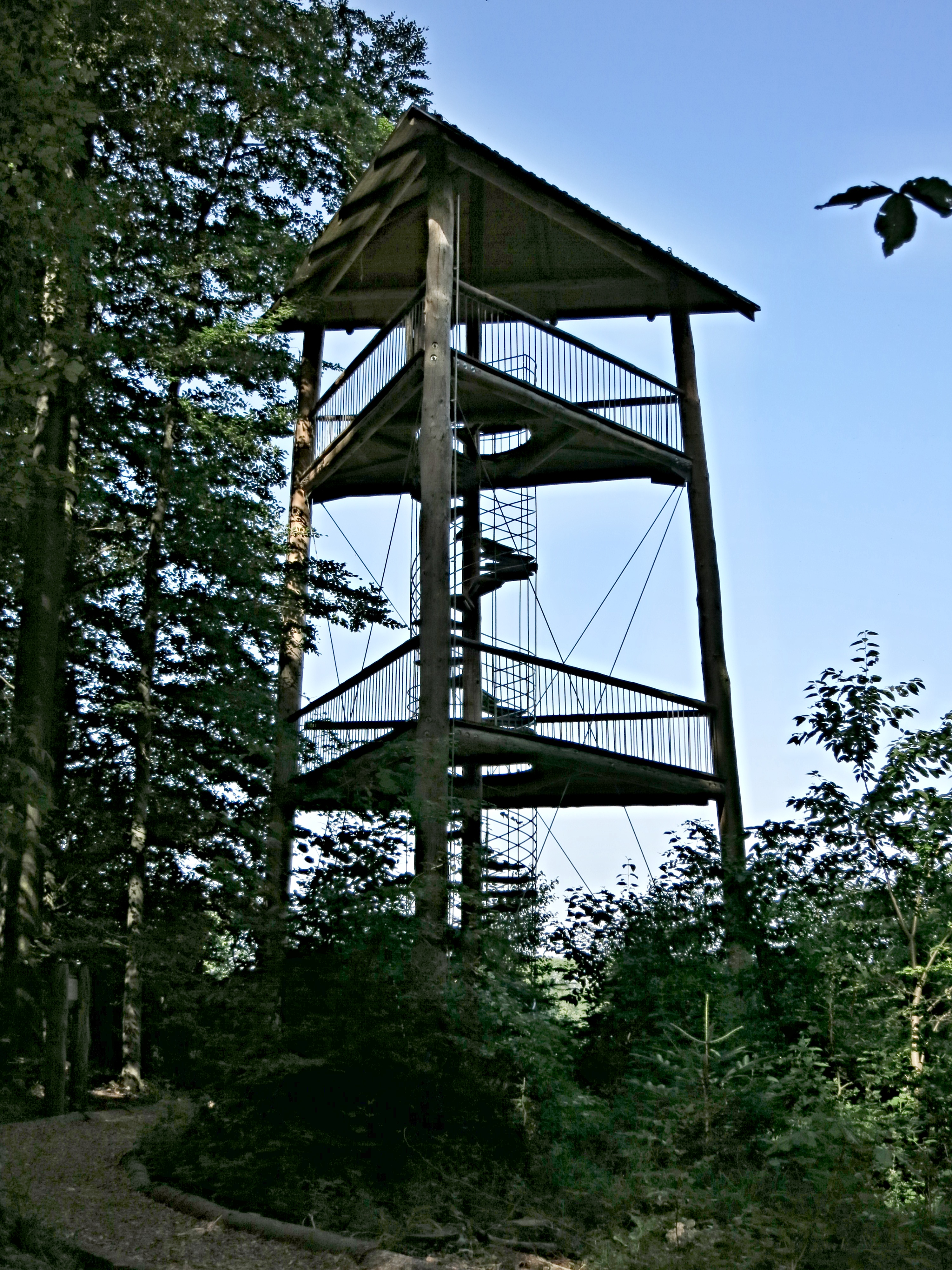 Erlebnisturm Waldpfad Binningen